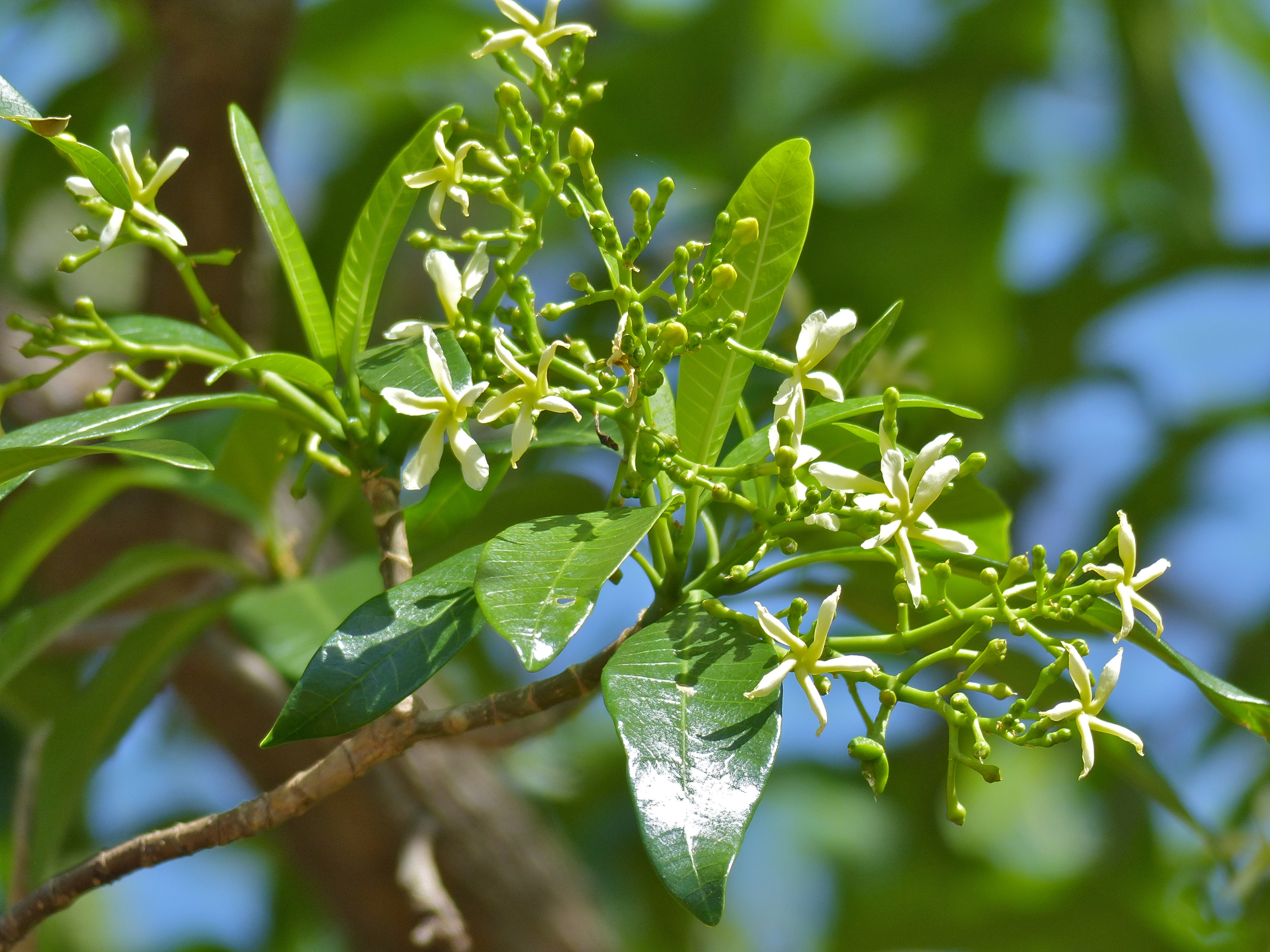 Mahonie Loop near Punda Maria, Kruger NP, SOUTH AFRICA